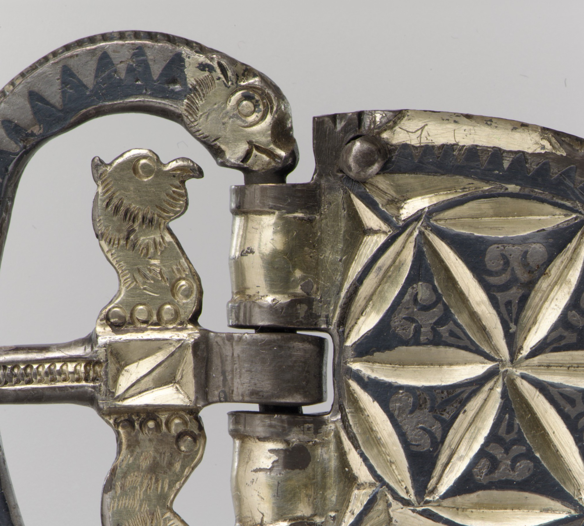 Late Roman; Buckle; Metalwork-Silver